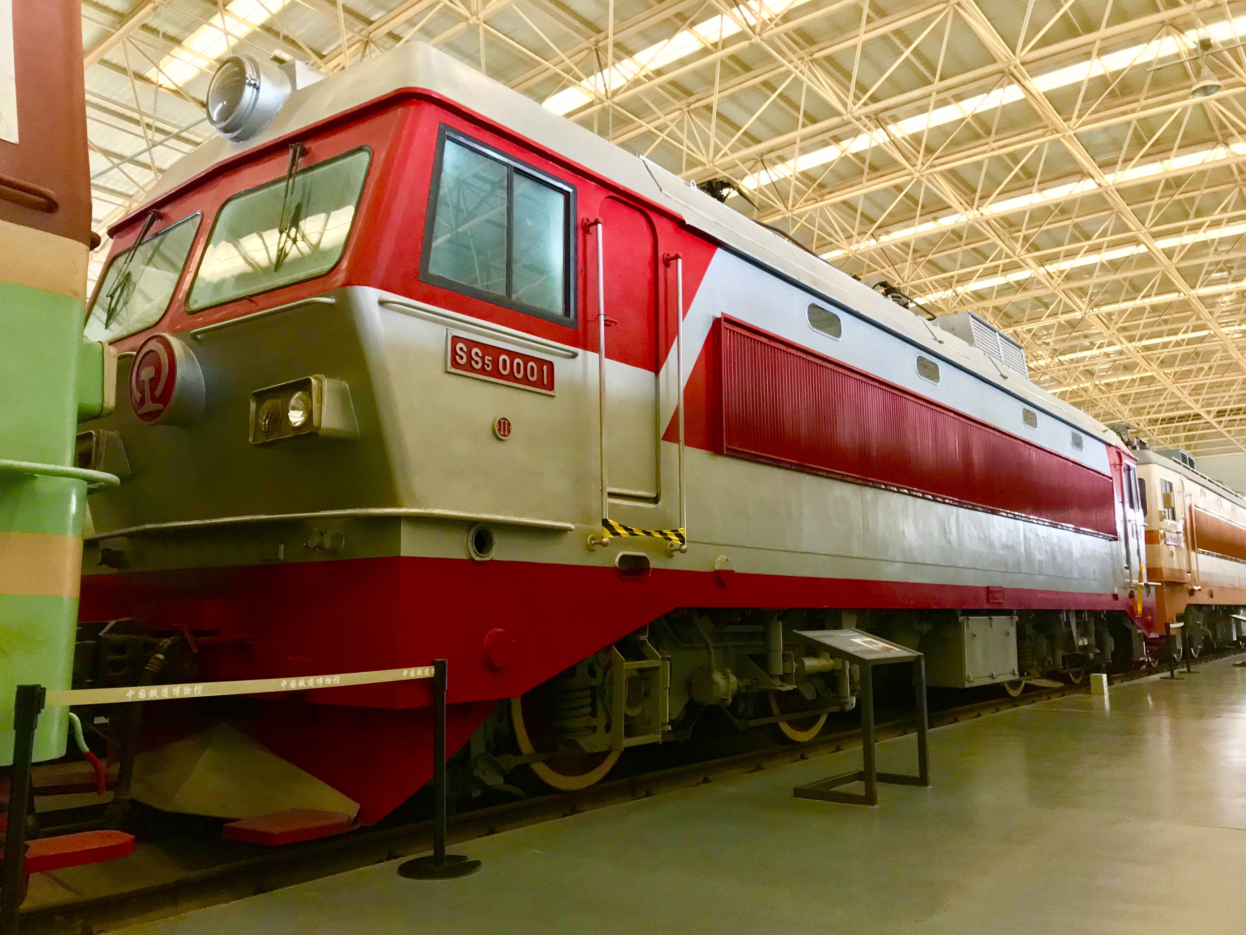 保存于中国铁道博物馆的韶山5型0001号电力机车